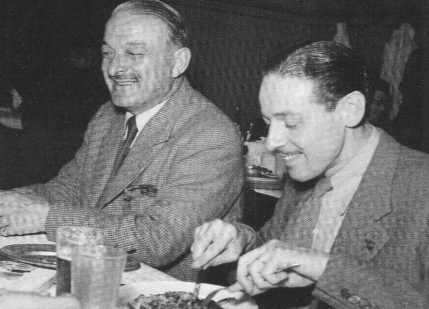 Jules Claude Cattelin (t.v.) skapare av restaurang Cattelin